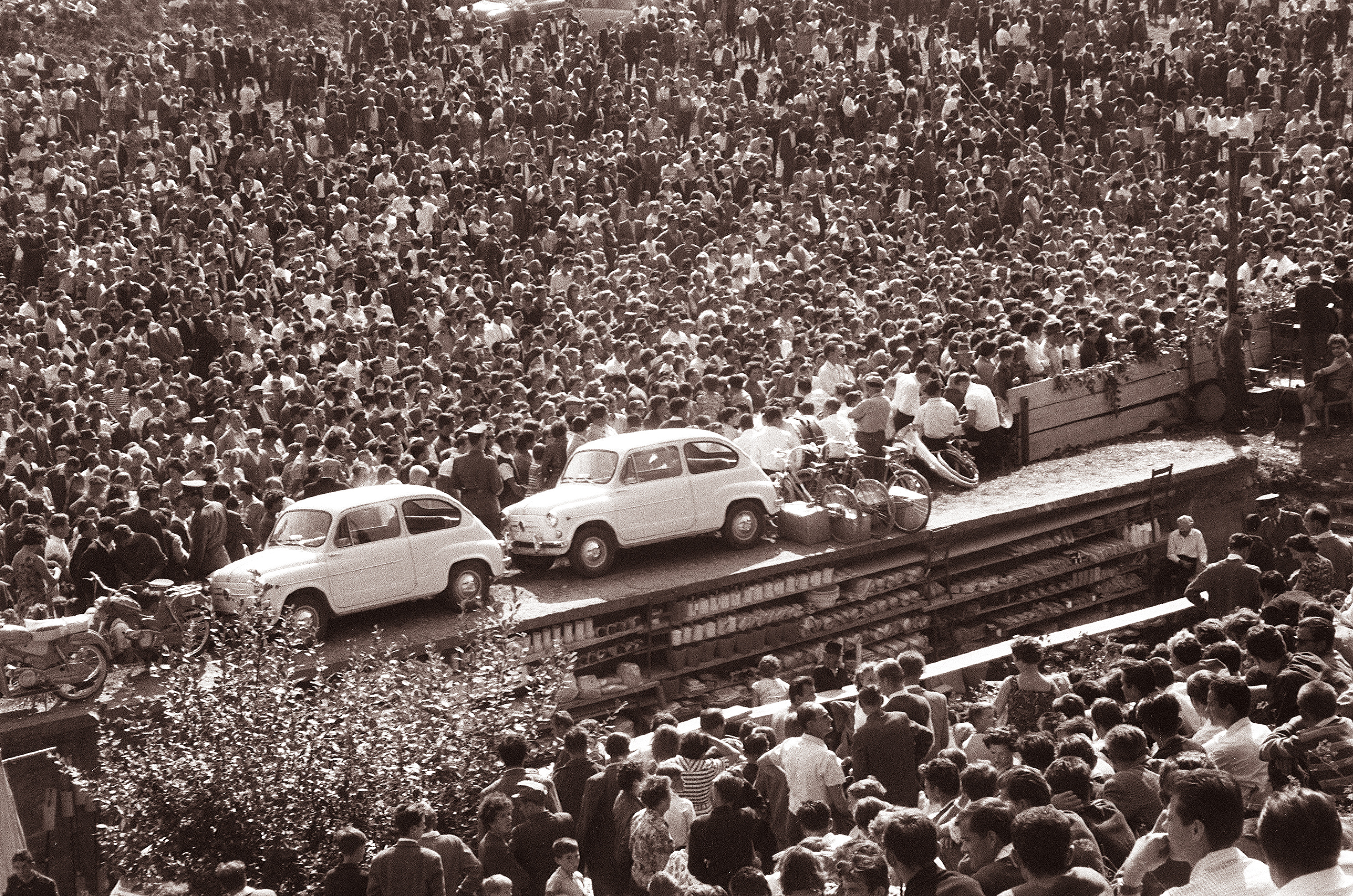 Nad petnajsttisoč ljudi na tomboli v Stražunu